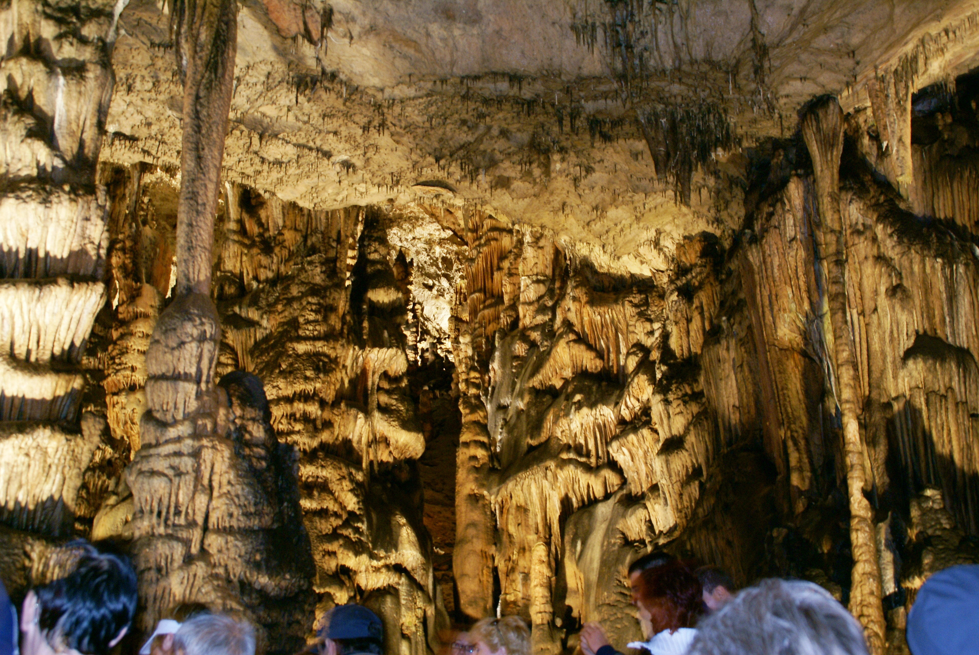 Aggtelek - Baradla barlang